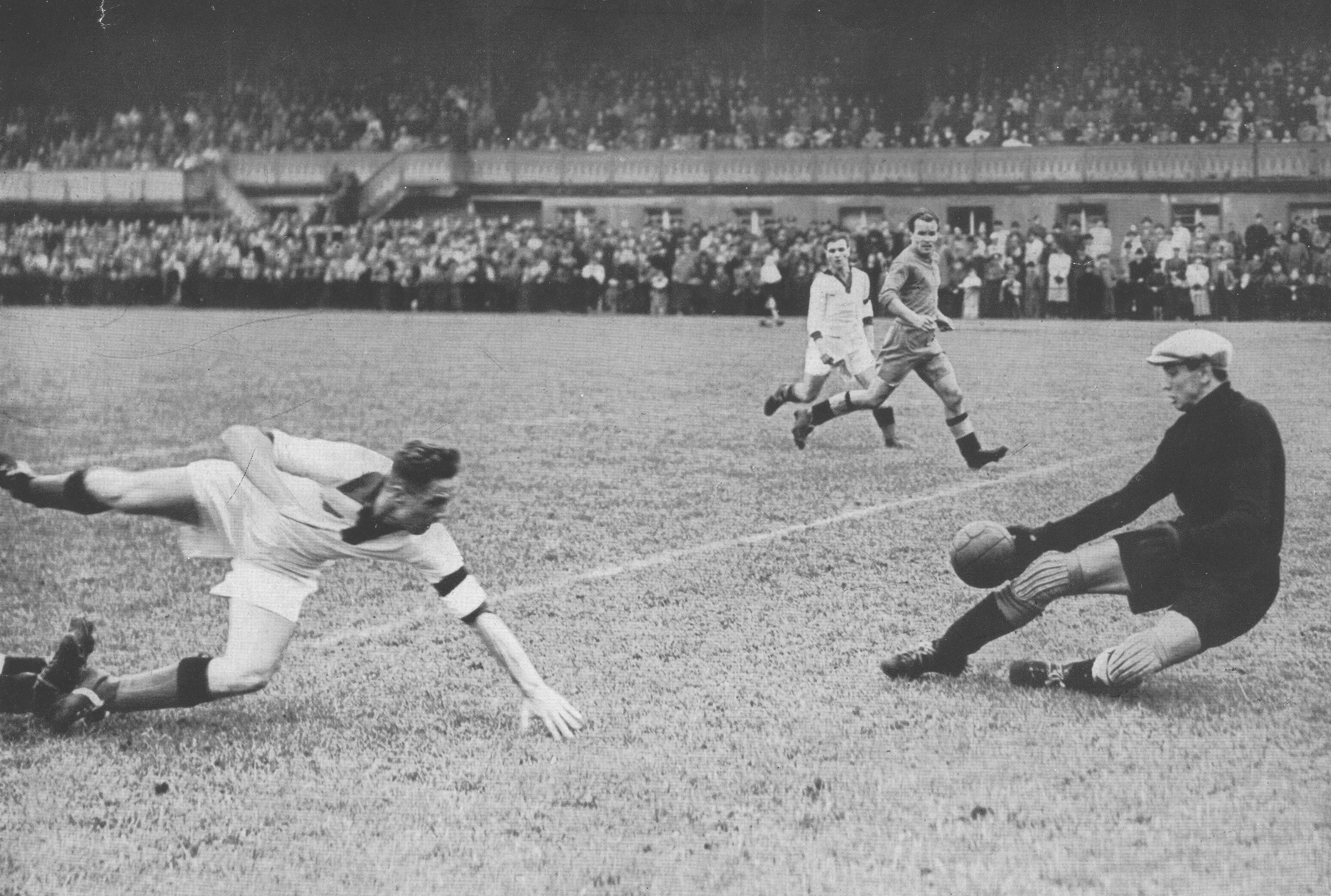 Mecz piłki nożnej pomiędzy reprezentacją Berlina i drużyną Wehrmachtu z Paryża w Berlinie – interweniuje bramkarz berlińczyków Helmut Jahn, po nieudanym strzale piłkarza Wehrmachtu Hacka (pierwszy z lewej).